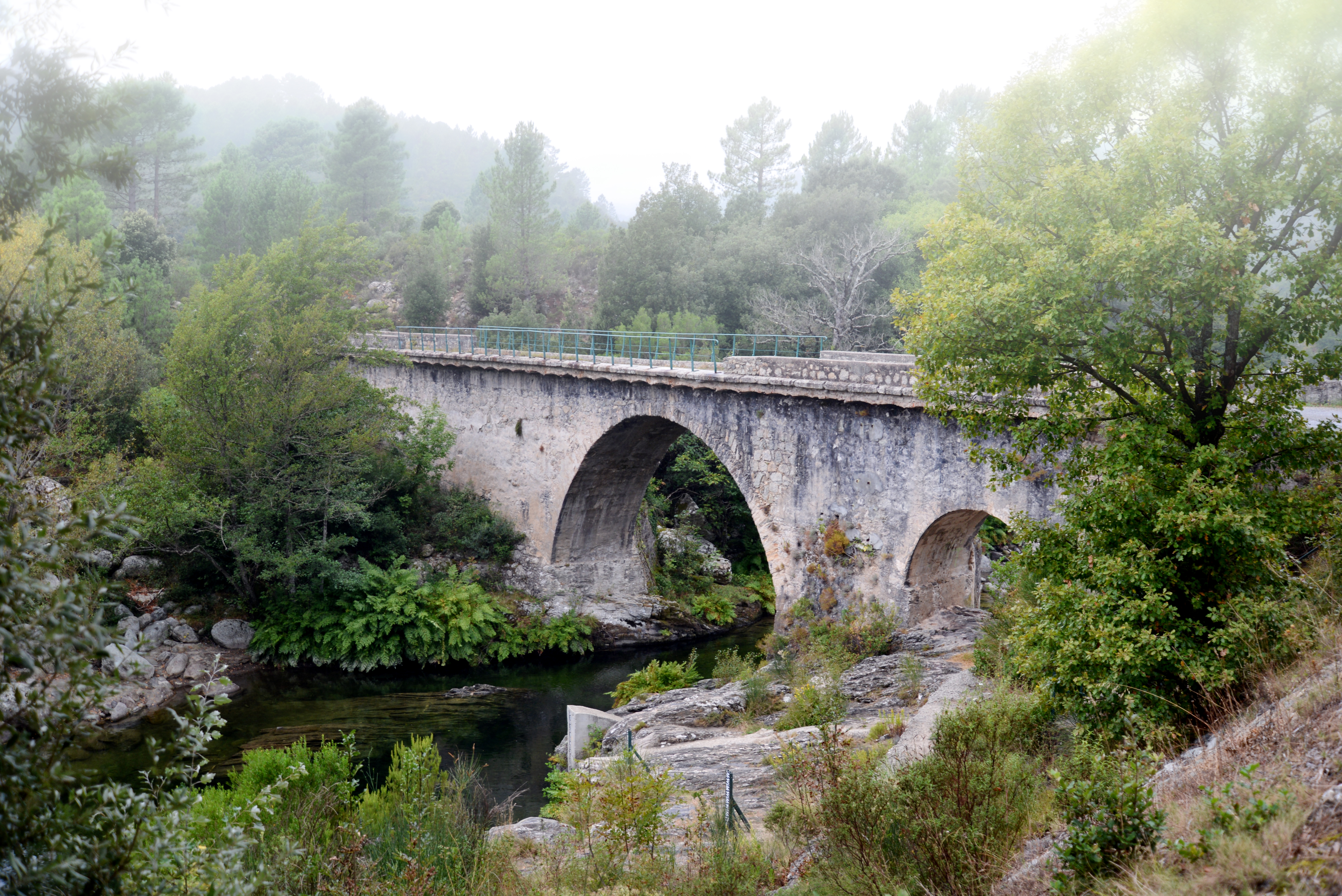 Venaco, Centre Haute-Corse - Vue en aval du Pont de Noceta sur la rivière Vecchio, à cheval sur Venaco et Noceta.